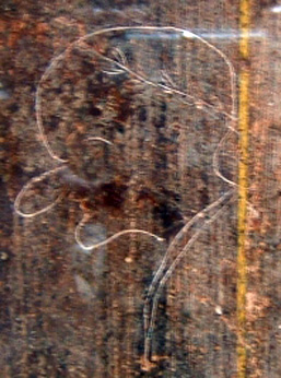 Caricature datant de l'Antiquité d'un homme politique retrouvée dans l'atrium de la villa des mystères de Pompéi. Cliché personnel publié sous les termes de la licence GFDL.